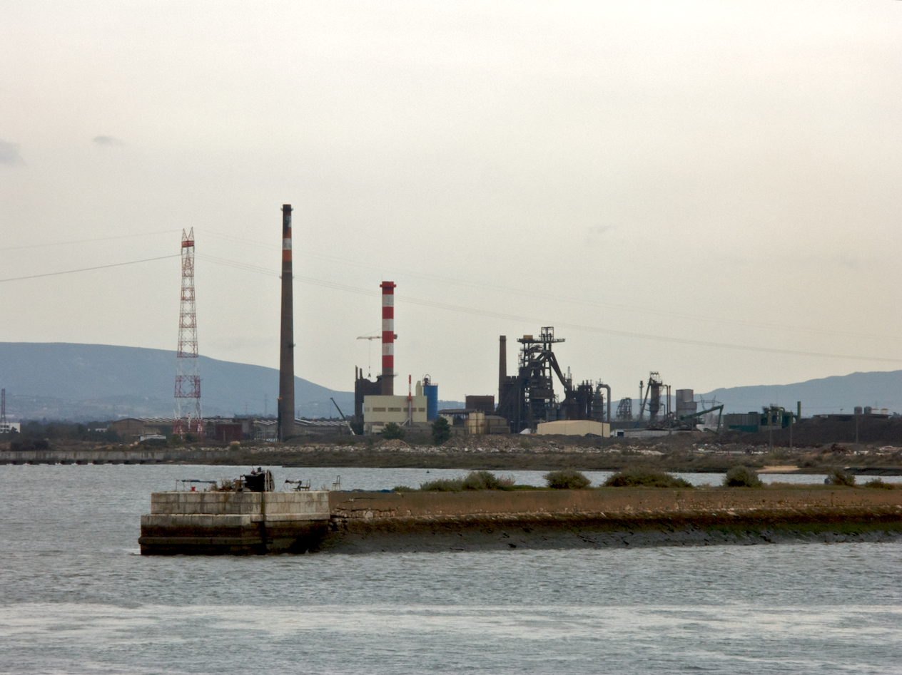 com a Siderurgia Nacional em segundo plano.